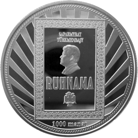 Памятная монета Туркменистана